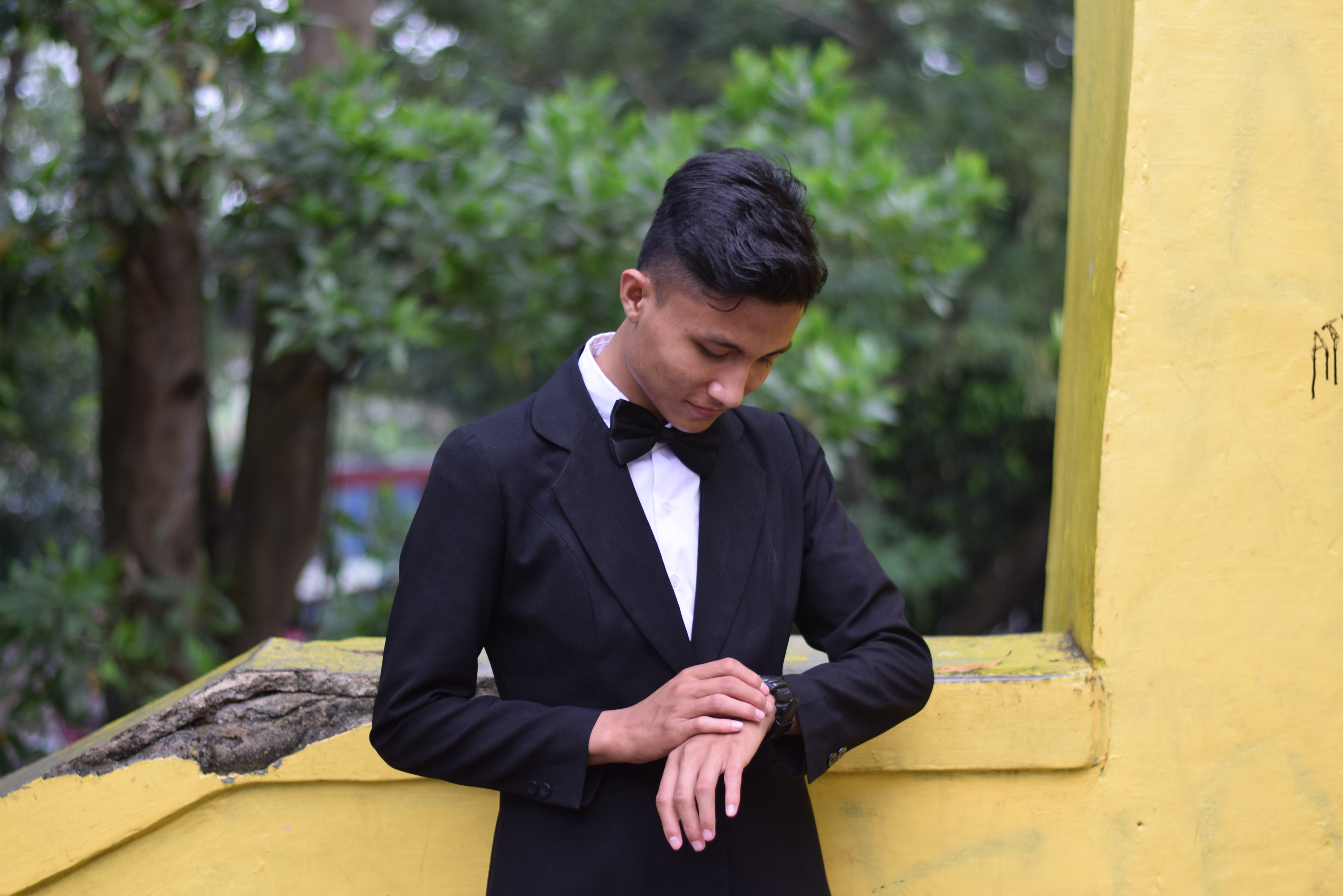 Nizar Sedang di potret